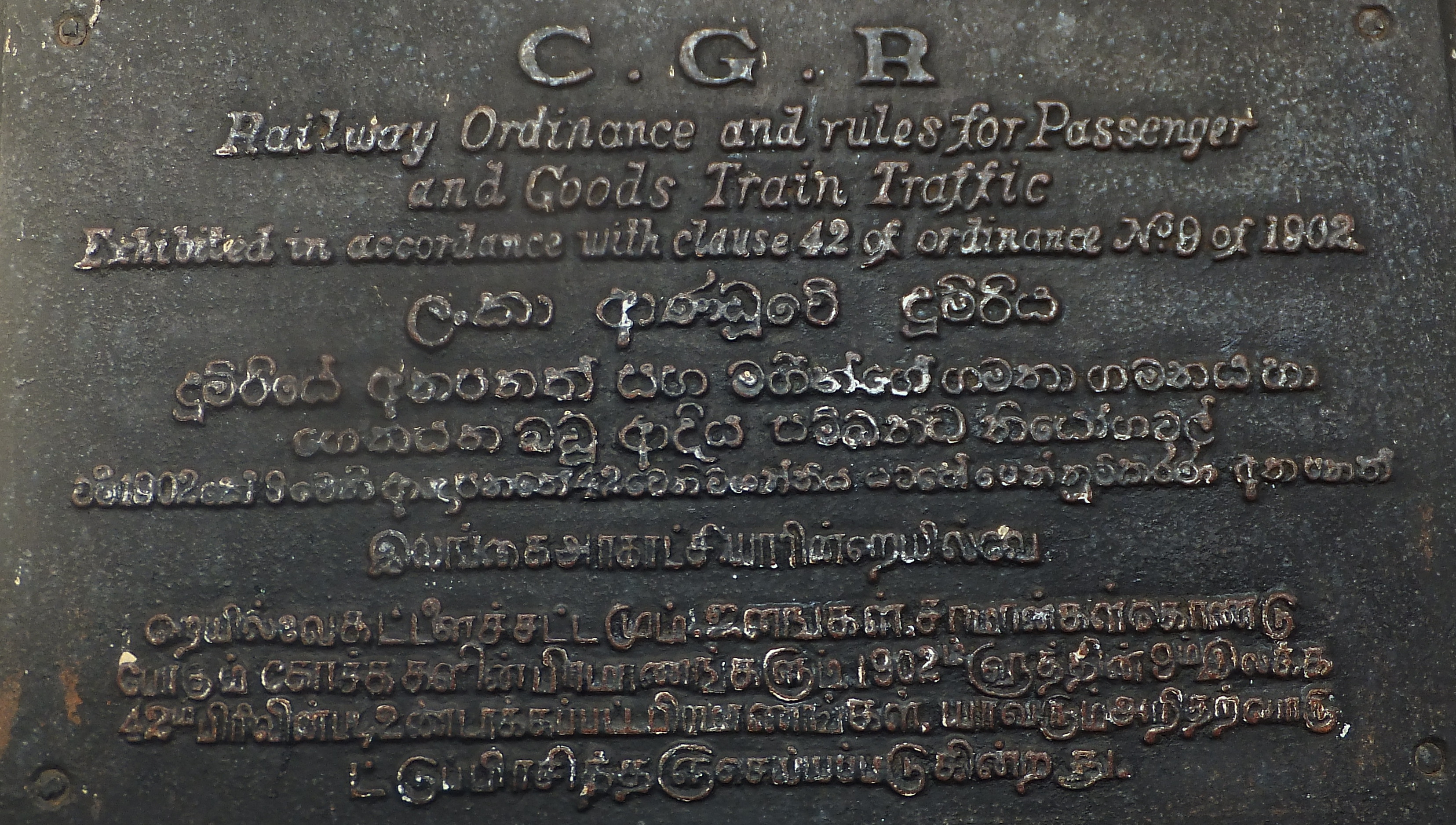 සිංහල: ඉදල්ගස්ඉන්න දුම්රිය ස්ථානයේ සවිකර ඇති ලංකා ආණ්ඩුවේ දුම්රිය සේවයට අදාල පැරණි පුවරුව.